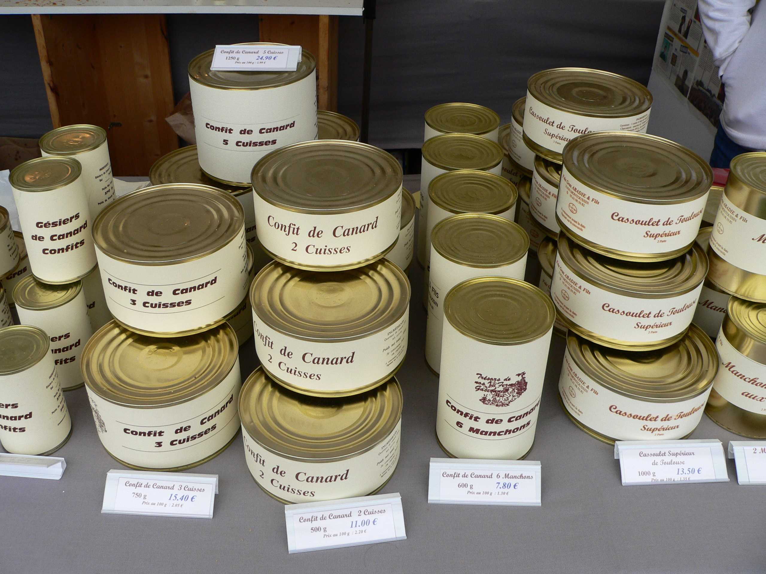 Fête de l’Humanité, 15 July 2006-17 July 2006